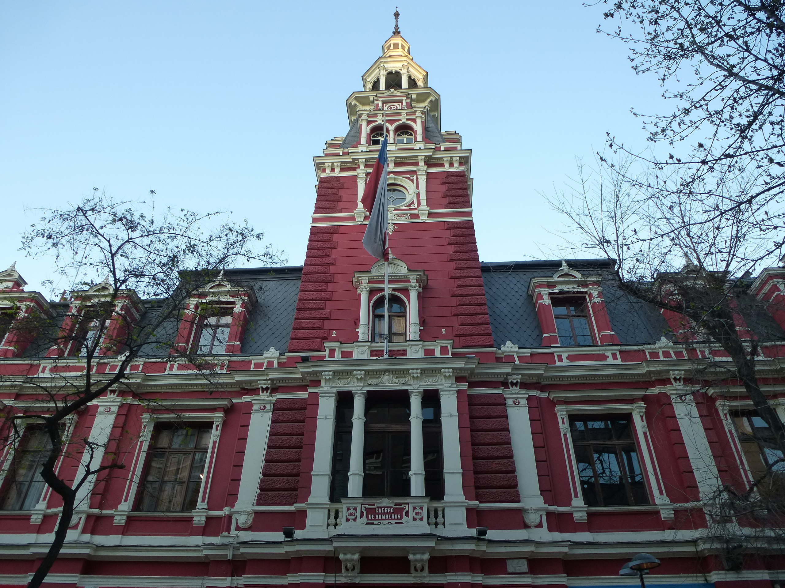 Cuartel General del Cuerpo de Bomberos de Santiago This is a photo of a national monument in Chile: 848